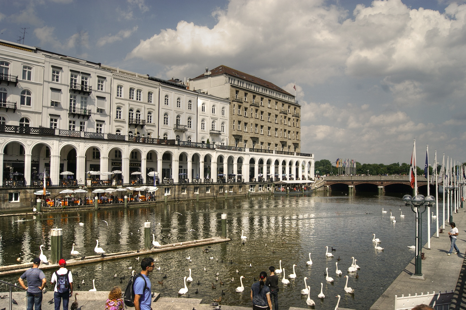 Alstermündung aus dem Alsterpark ins Zentrum.